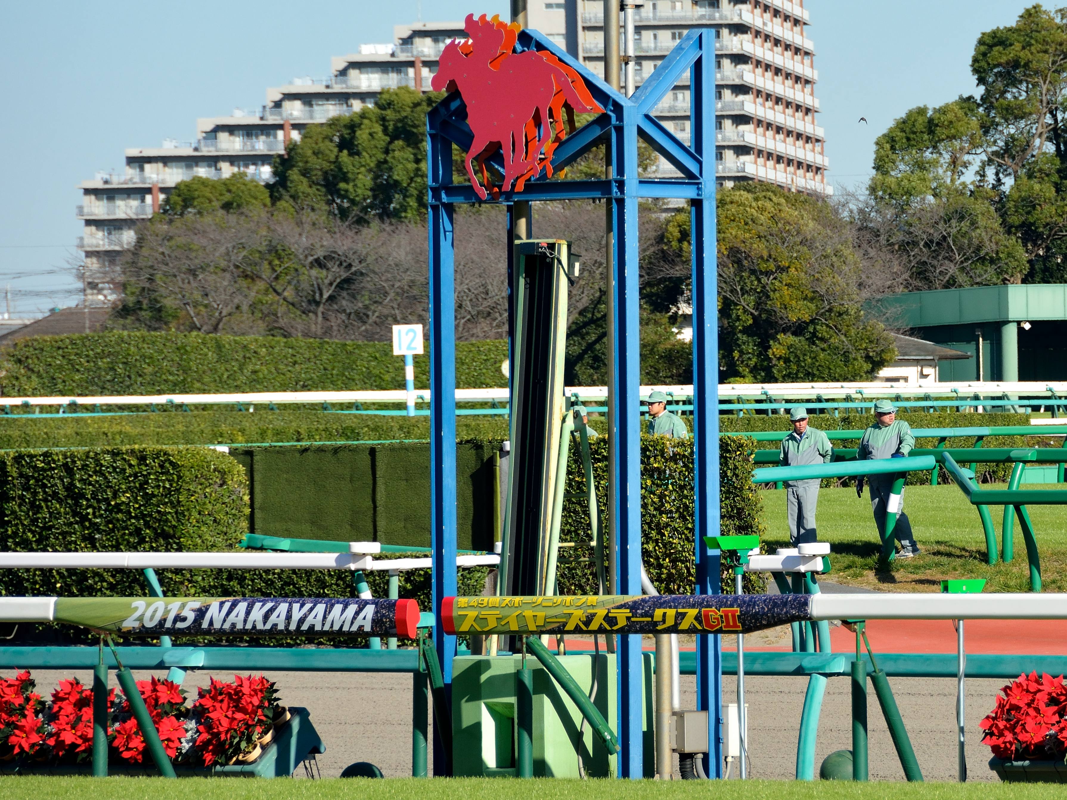 2015年12月5日（土）に中山競馬場で、ゴール板前のコース柵へ「第49回ステイヤーズステークス」の装飾が施されたところを、観客席から撮影。